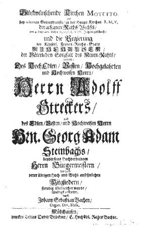 Titelseite des Drucks der Bachkantate BWV 71 "Gott ist mein König" aus dem Jahre 1708